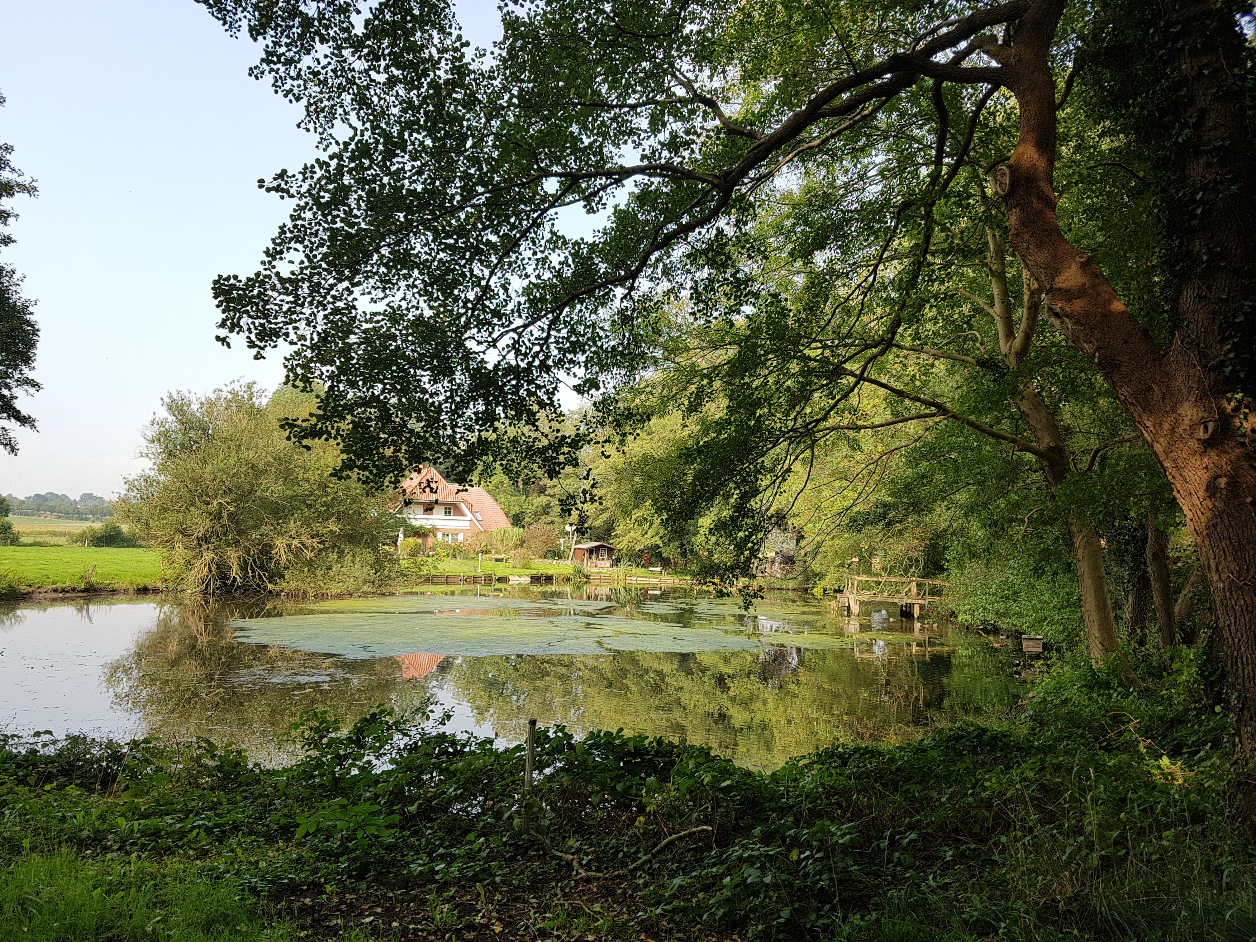 Möhlendiek von de fröhere Watermöhl Lüttmöhlen